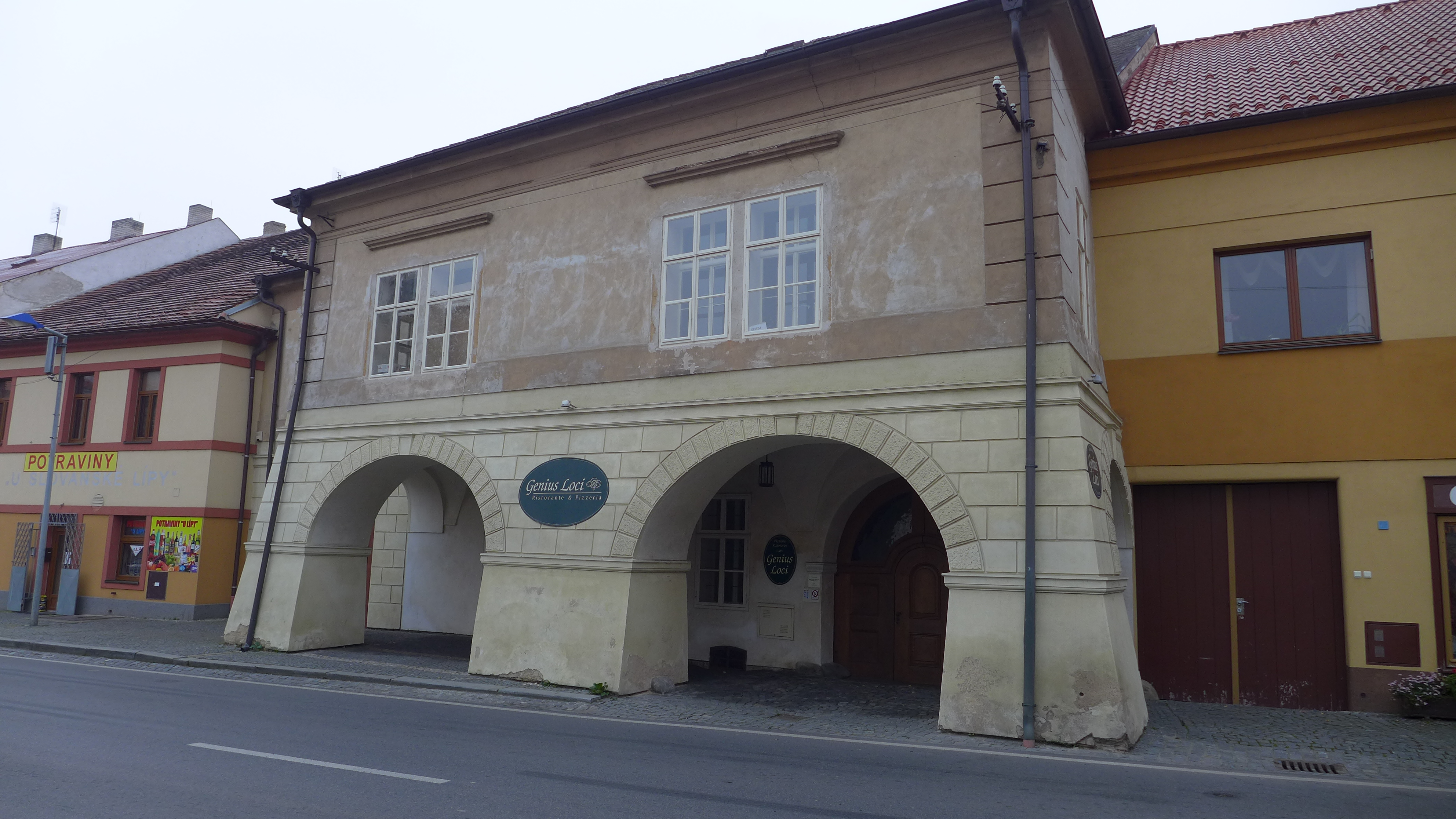 Dům čp. 54, Náměstí 54, Žebrák (okres Beroun).